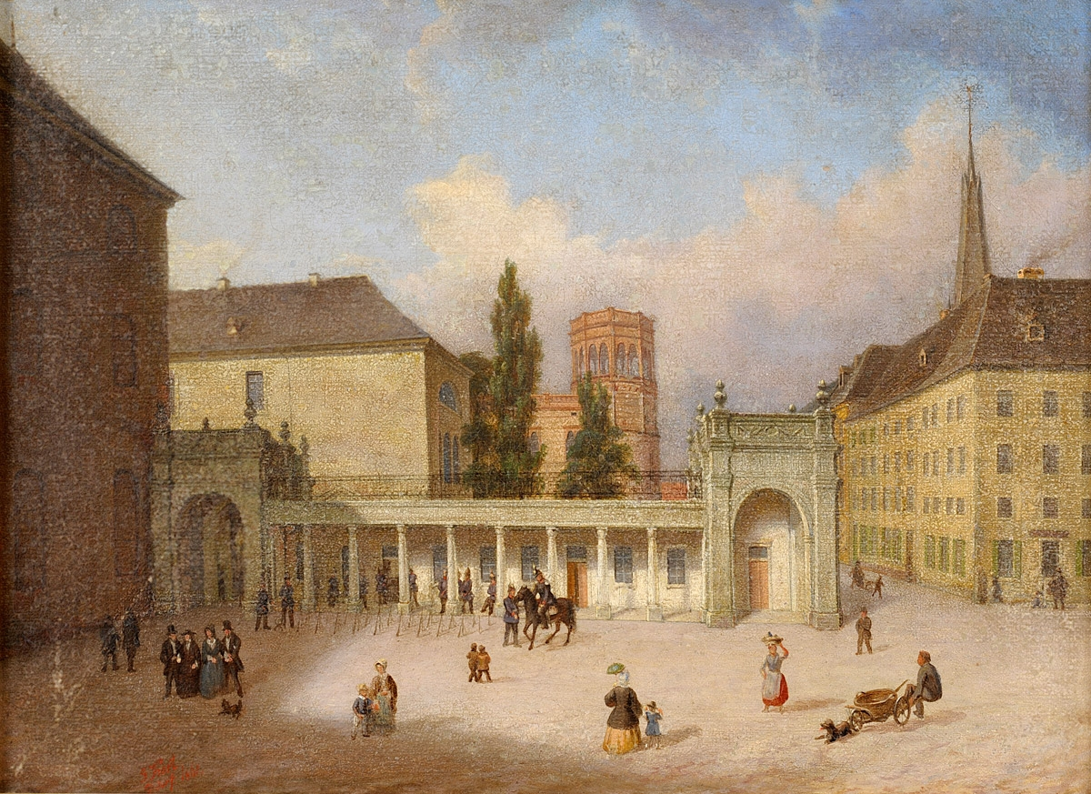 Düsseldorfer Stadtansicht (Blick auf Wache, Akademie und Schlossturm mit neuer Laterne von August Stüler von 1845). Signiert. Datiert 1861. Öl auf Leinwand, je 33 x 45 cm